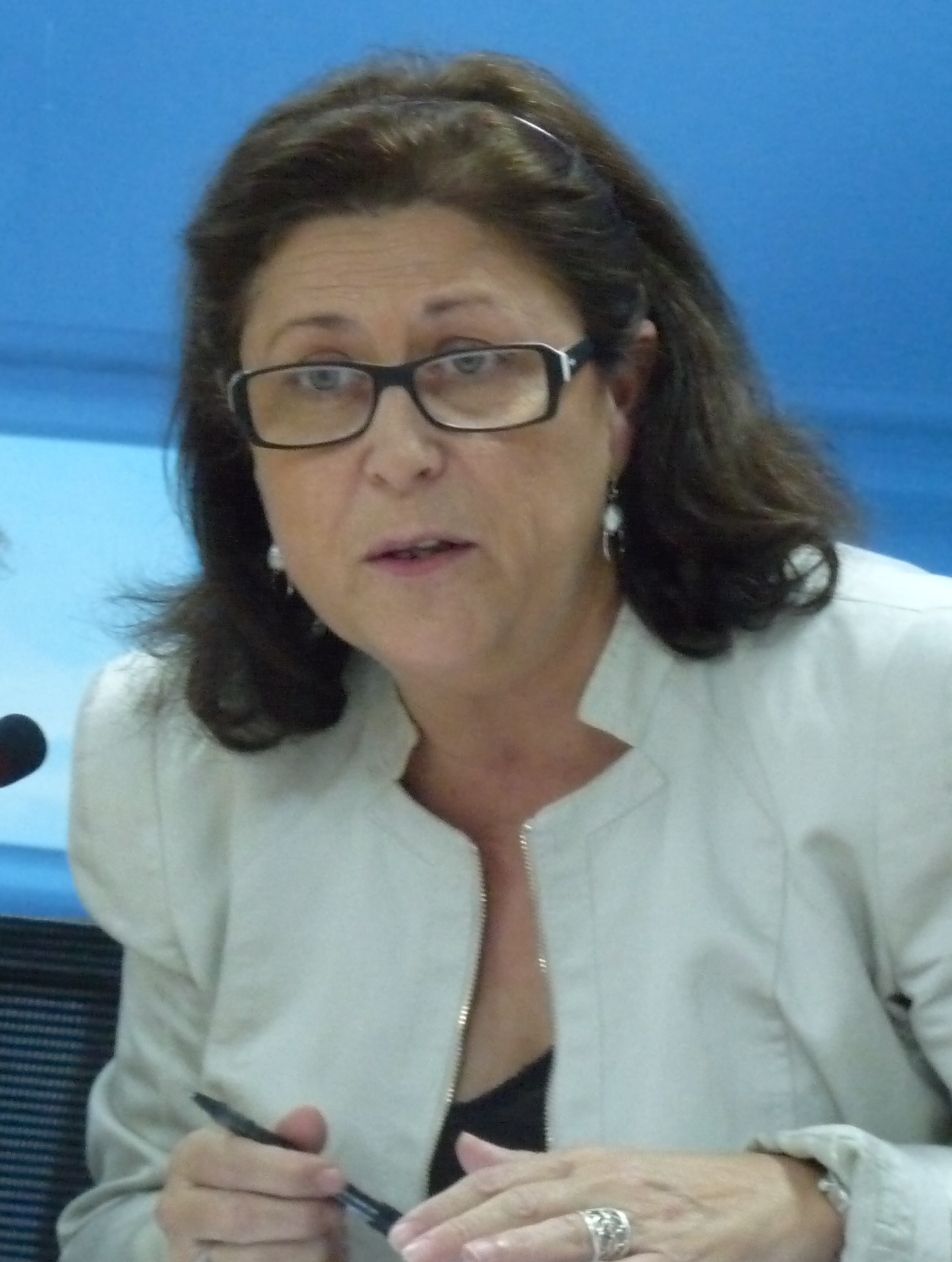 La diputada en el Congreso, Marisol Pérez